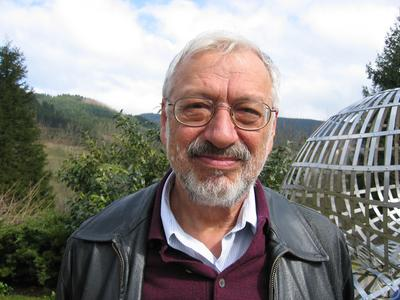 Foto di Yiannis Moschovakis